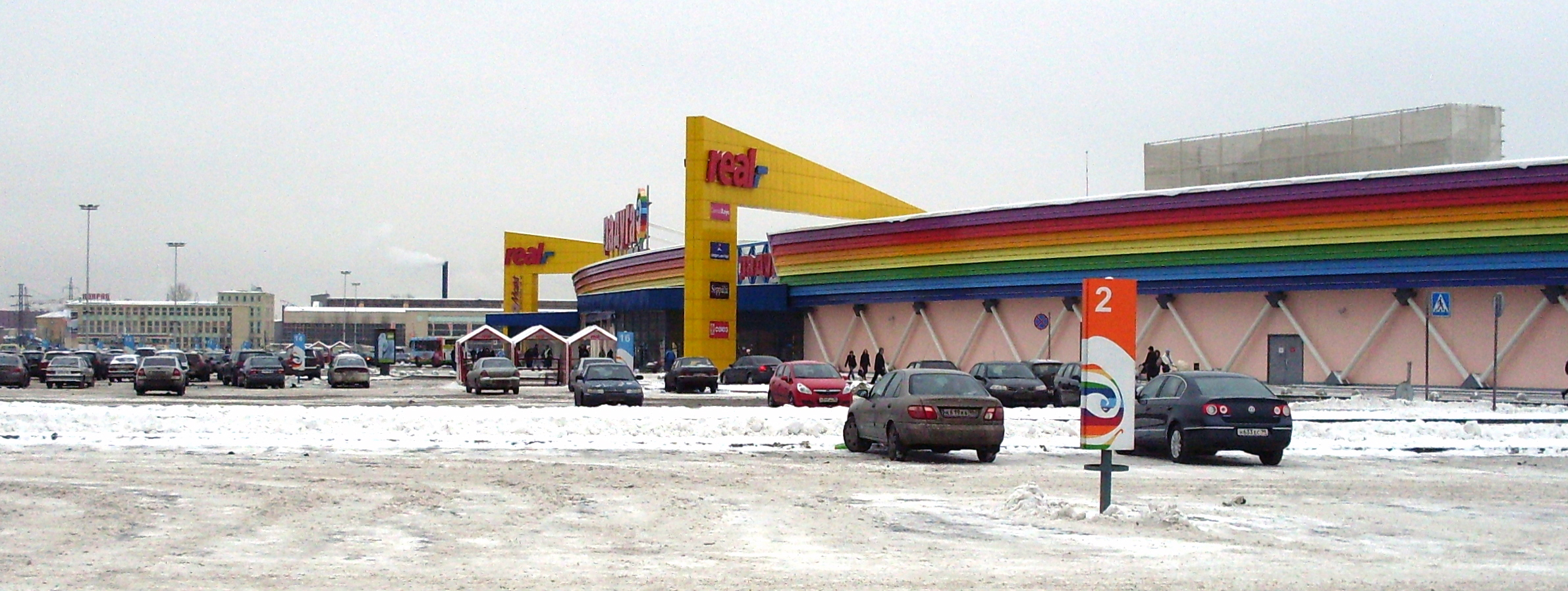 ТРЦ "Радуга", Санкт-Петербург